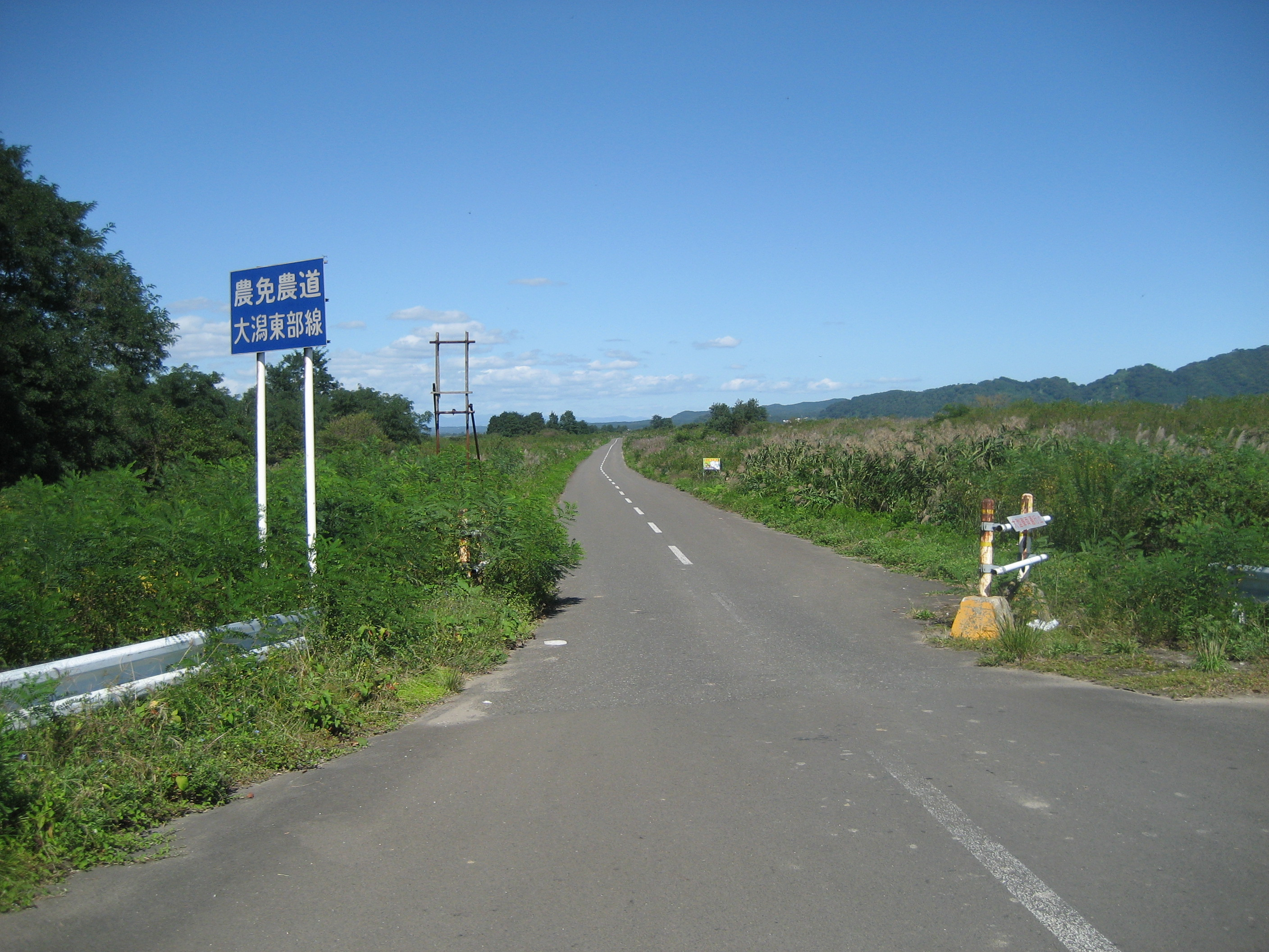 農免農道大潟東部線 秋田県大潟村県道298号線交差点北側付近